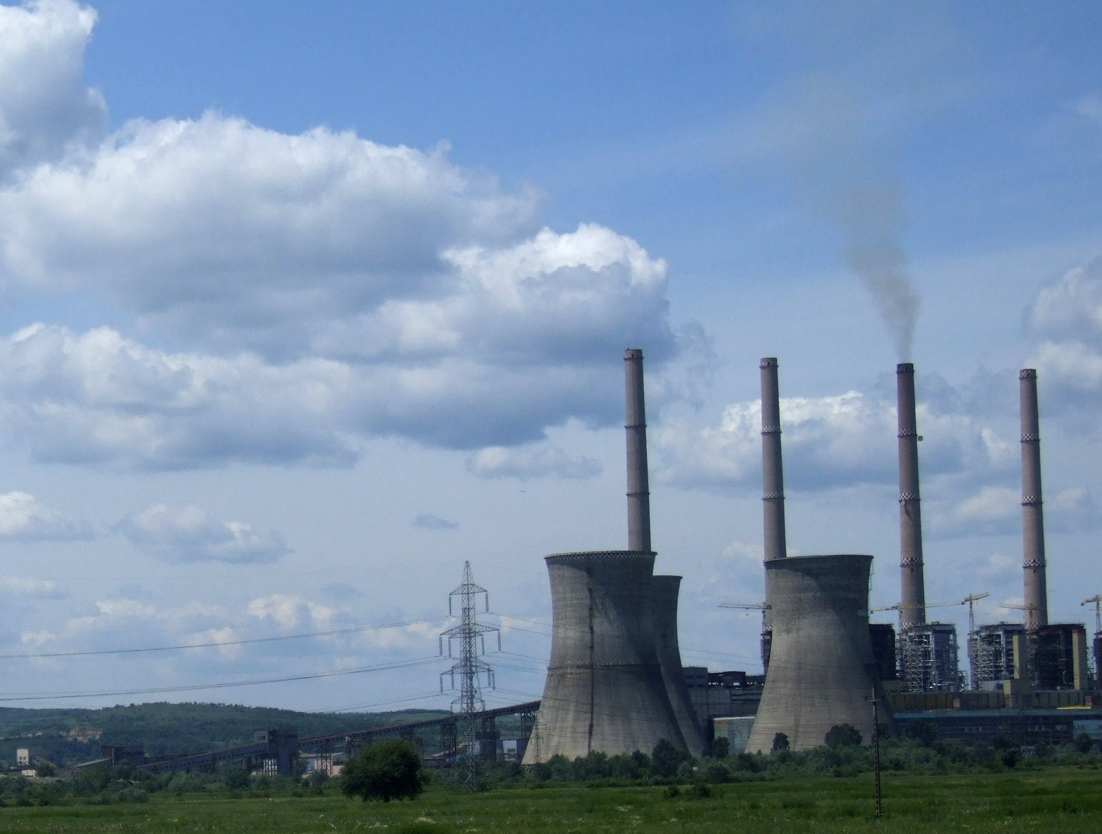 Kraftwerk Turceni